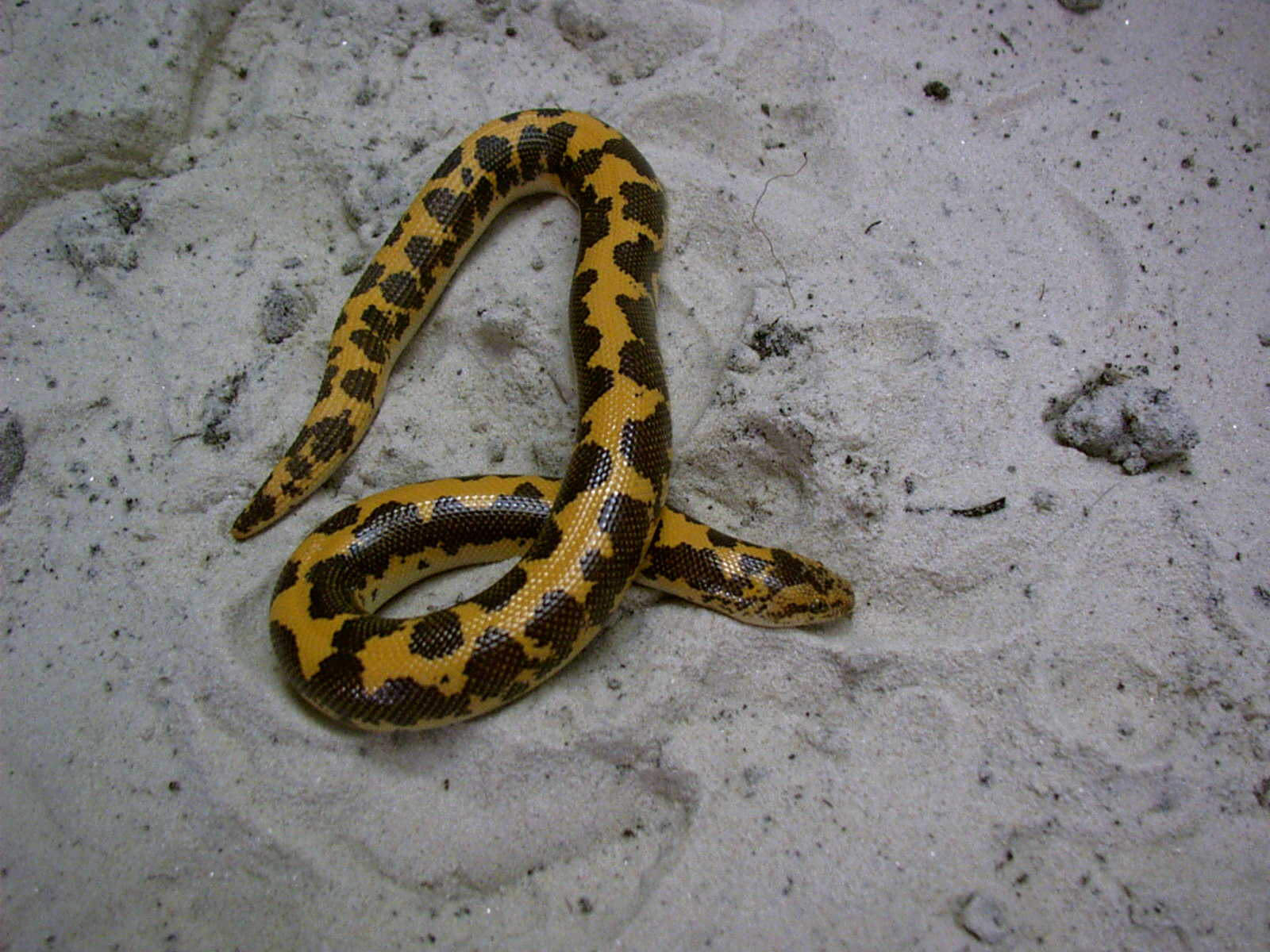 Etwa 18-monatiges Weibchen der Art Gongylophis colubrinus loveridgei in eigener Terrarienanlage. Foto ist selbstfotografiert und steht unter der Lizenz: GNUFDL